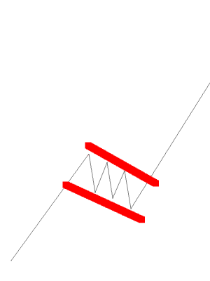 Ein Bild eines Beispielcharts einer bullishenFlagge